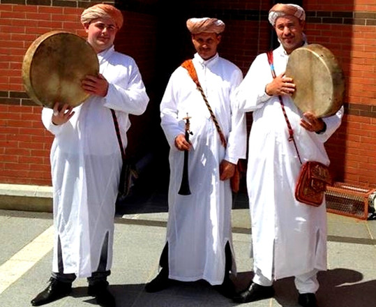 exemple de tenu des groupe aarfa